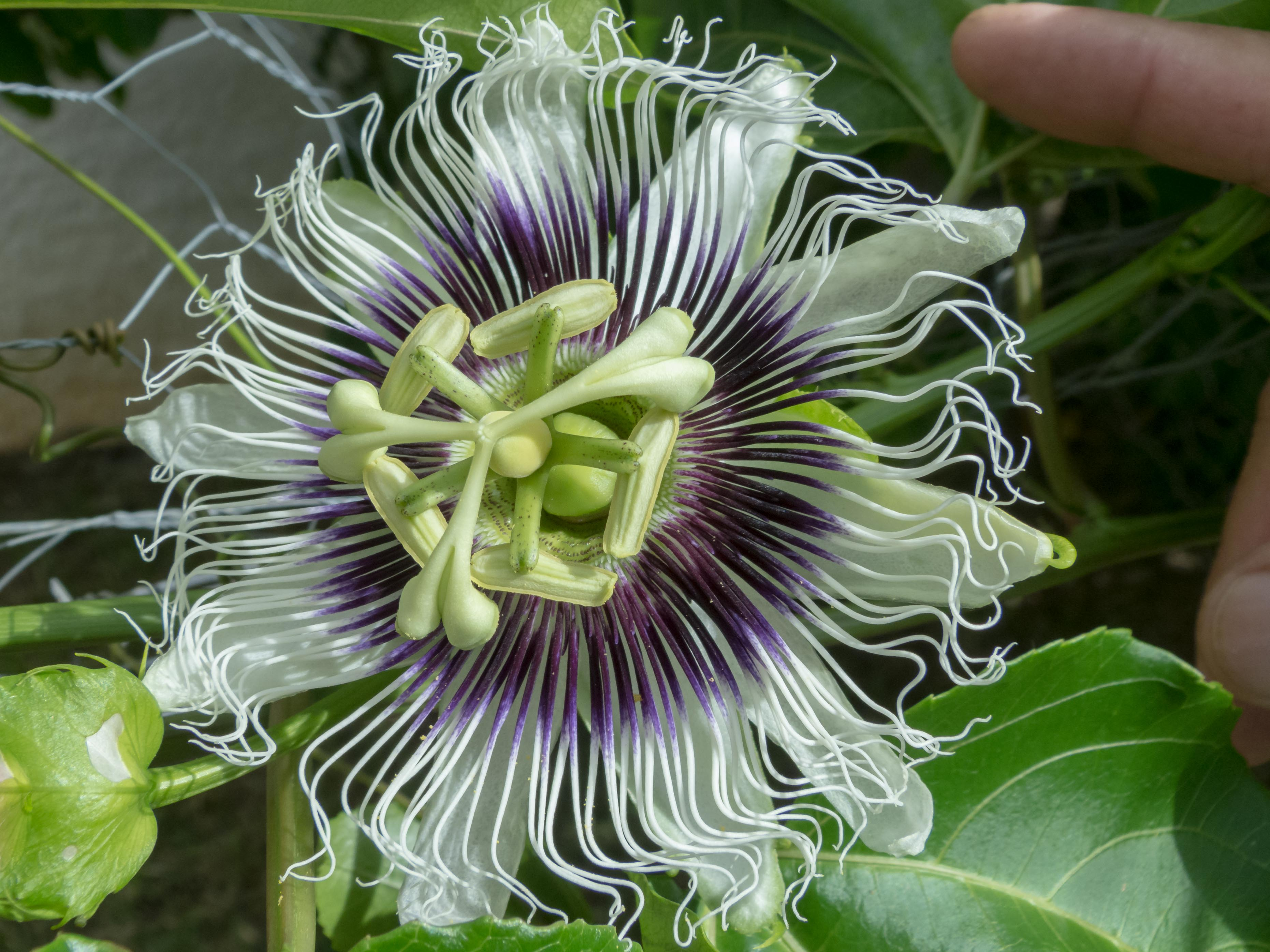 Flor de Maracujá - Paty do Alferes, Brasil.